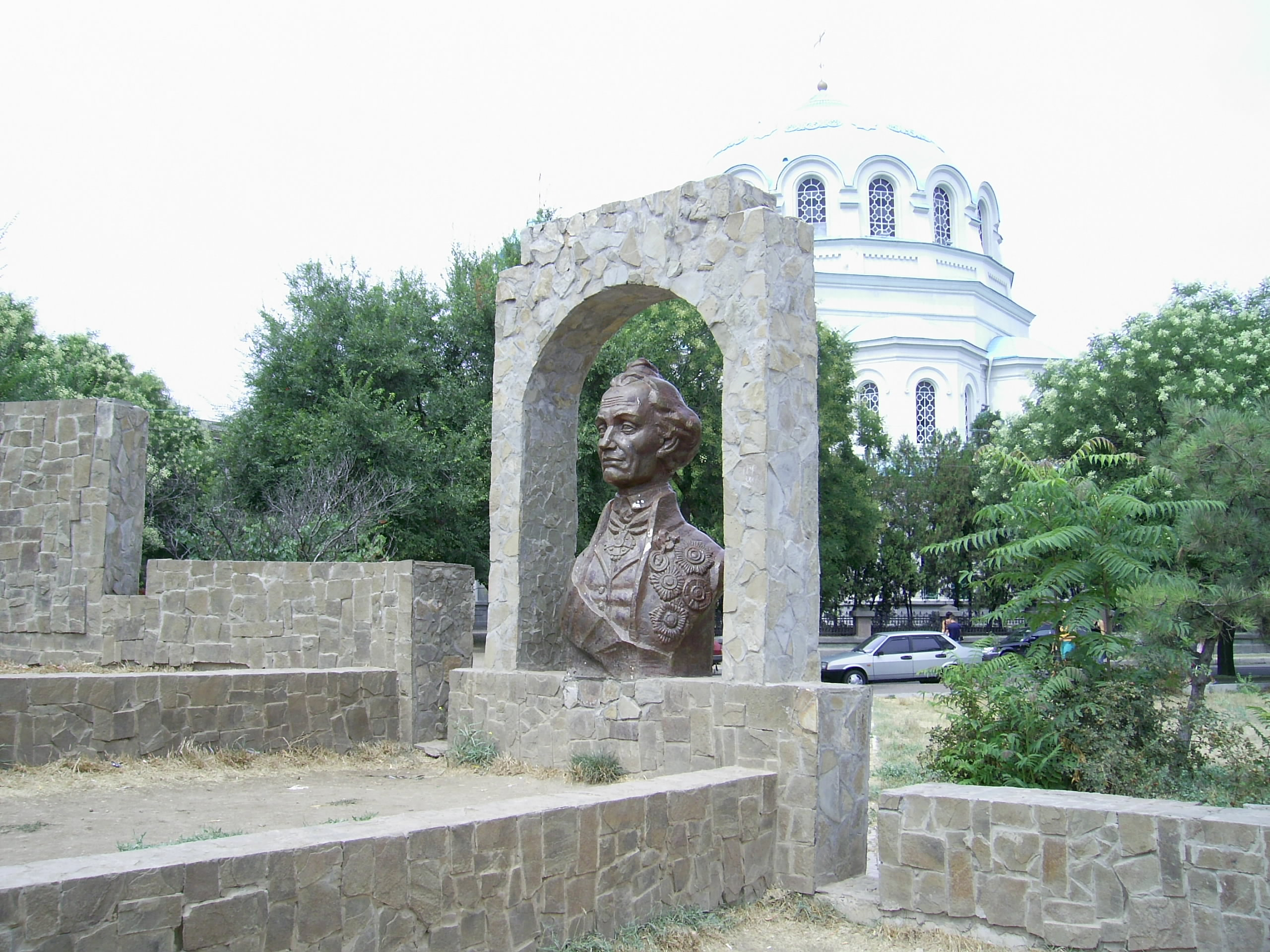 Памятні місця в Євпаторії